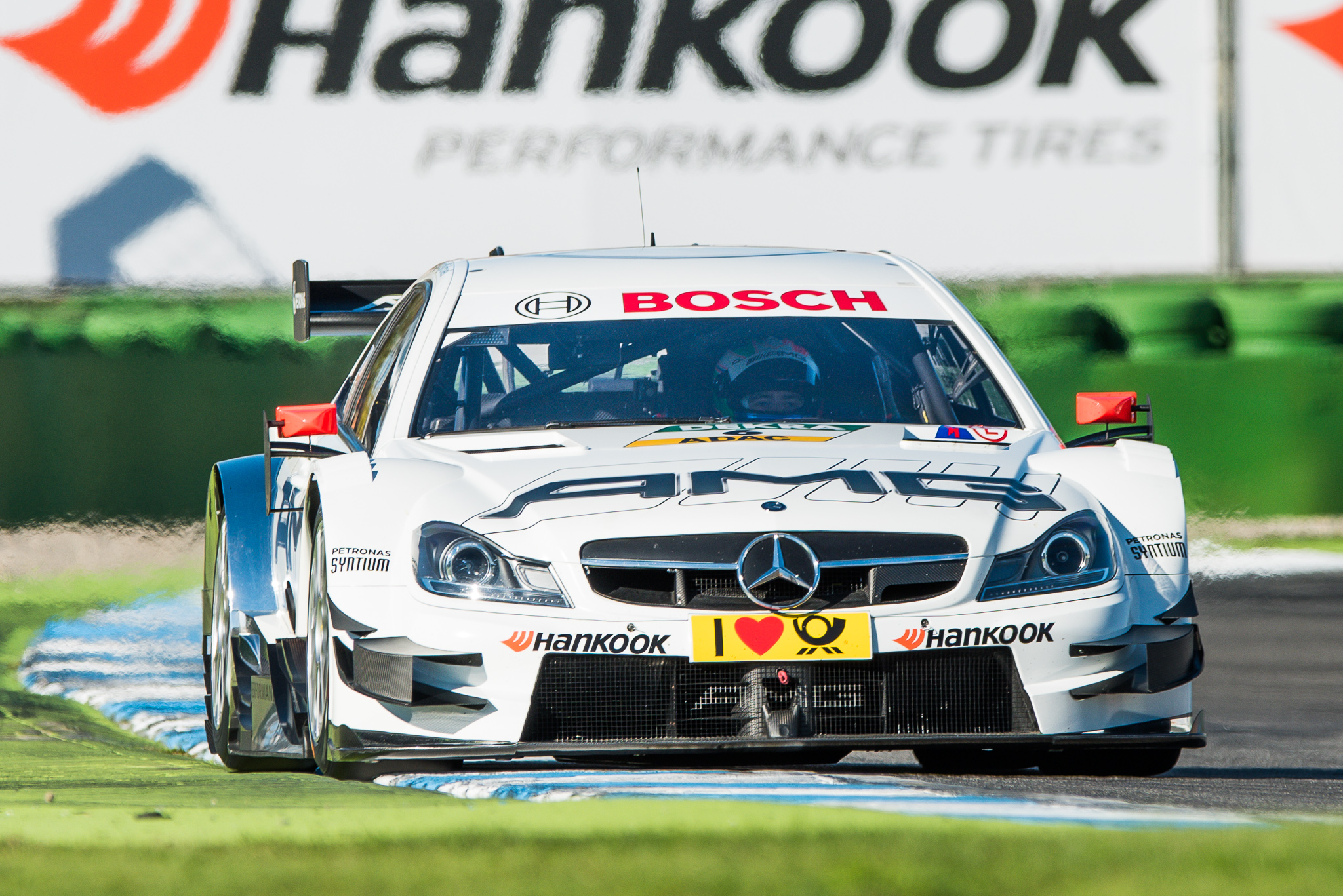 DTM,Deutsche Tourenwagen Masters,HWA AG,Hockenheimring,Mercedes AMG C-Coupe,Motorsport,Paul Di Resta